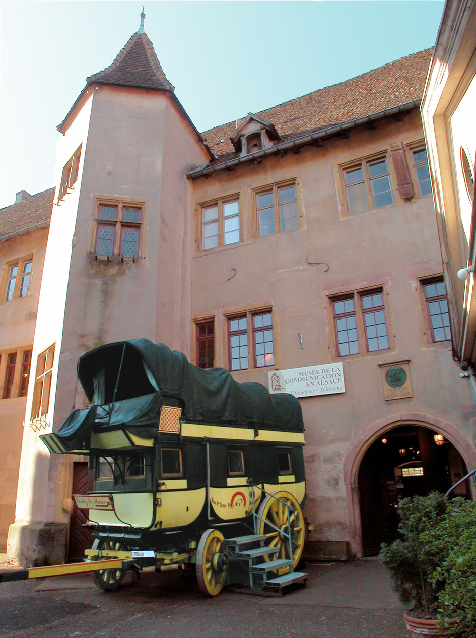 Facade musee de la communication: Riquewihr (dép. du Haut-Rhin, Alsace, France), ancien château des Comtes de Wurtemberg, aujourd'hui Musée de la Communication en Alsace.